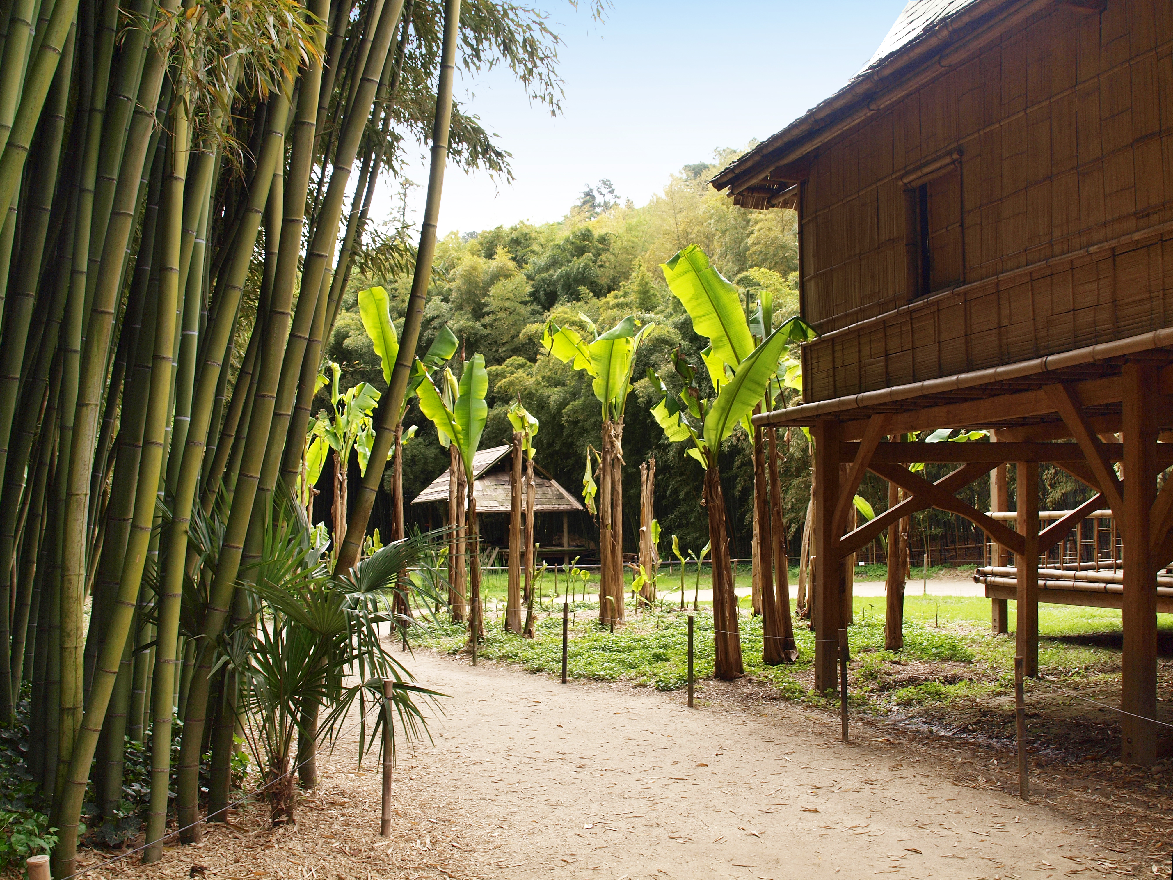 Générargues (Gard -France) - Village laotien de la Bambouseraie